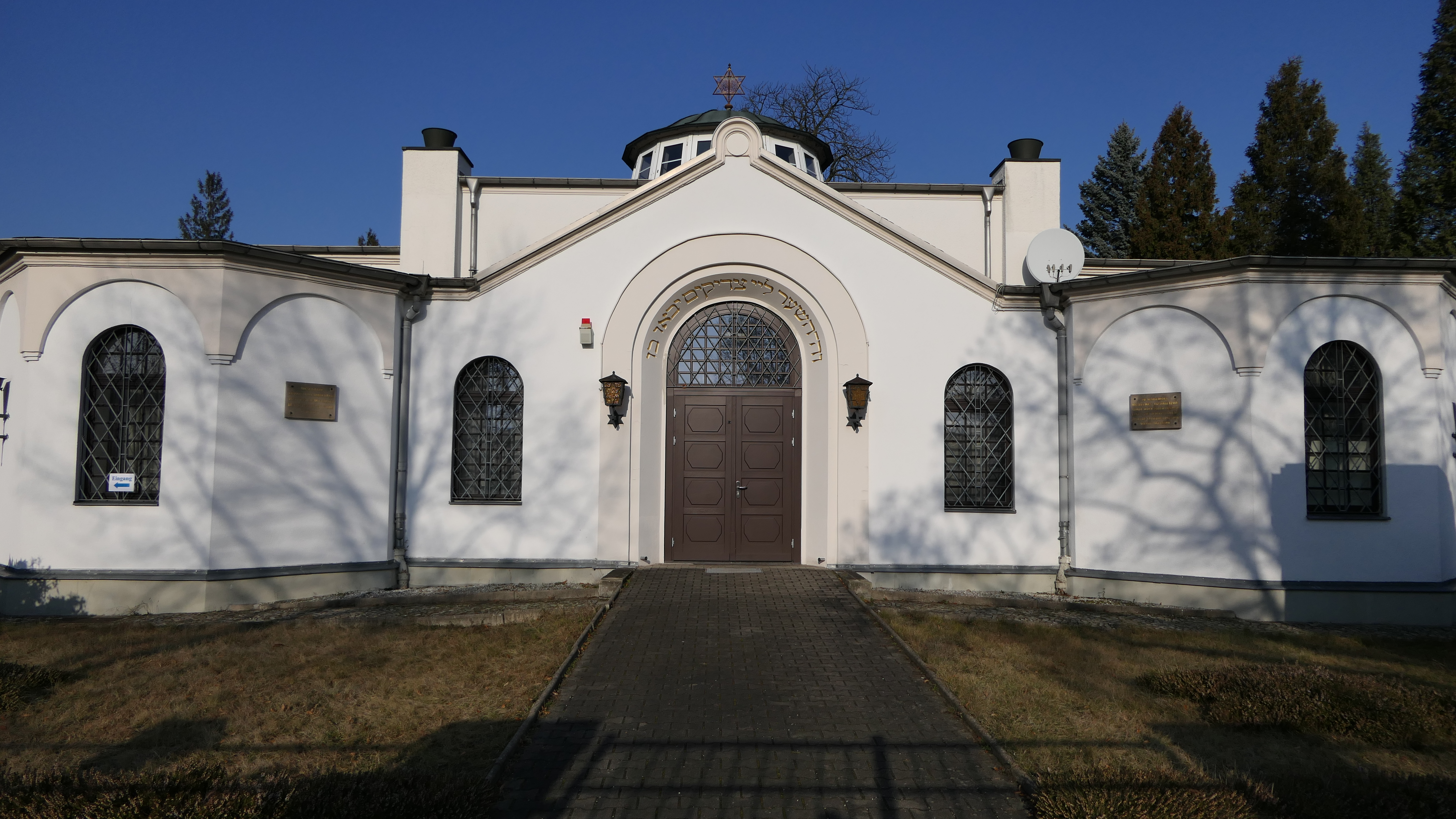 Neuer Jüdischer Friedhof Dresden